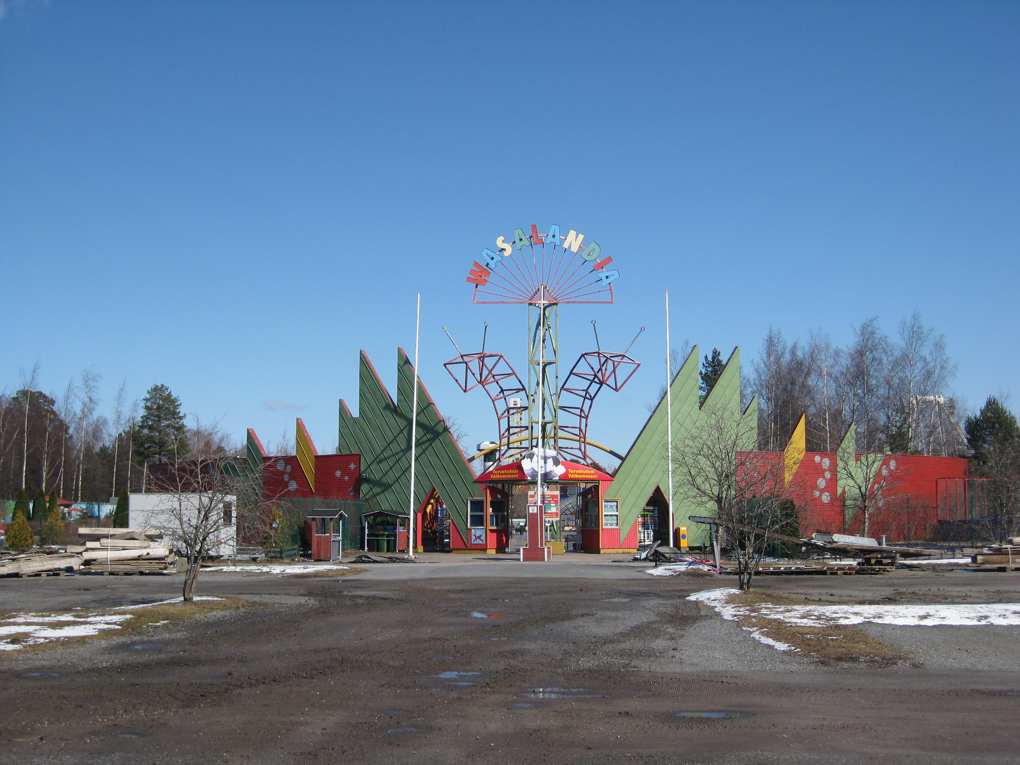 Wasalandia